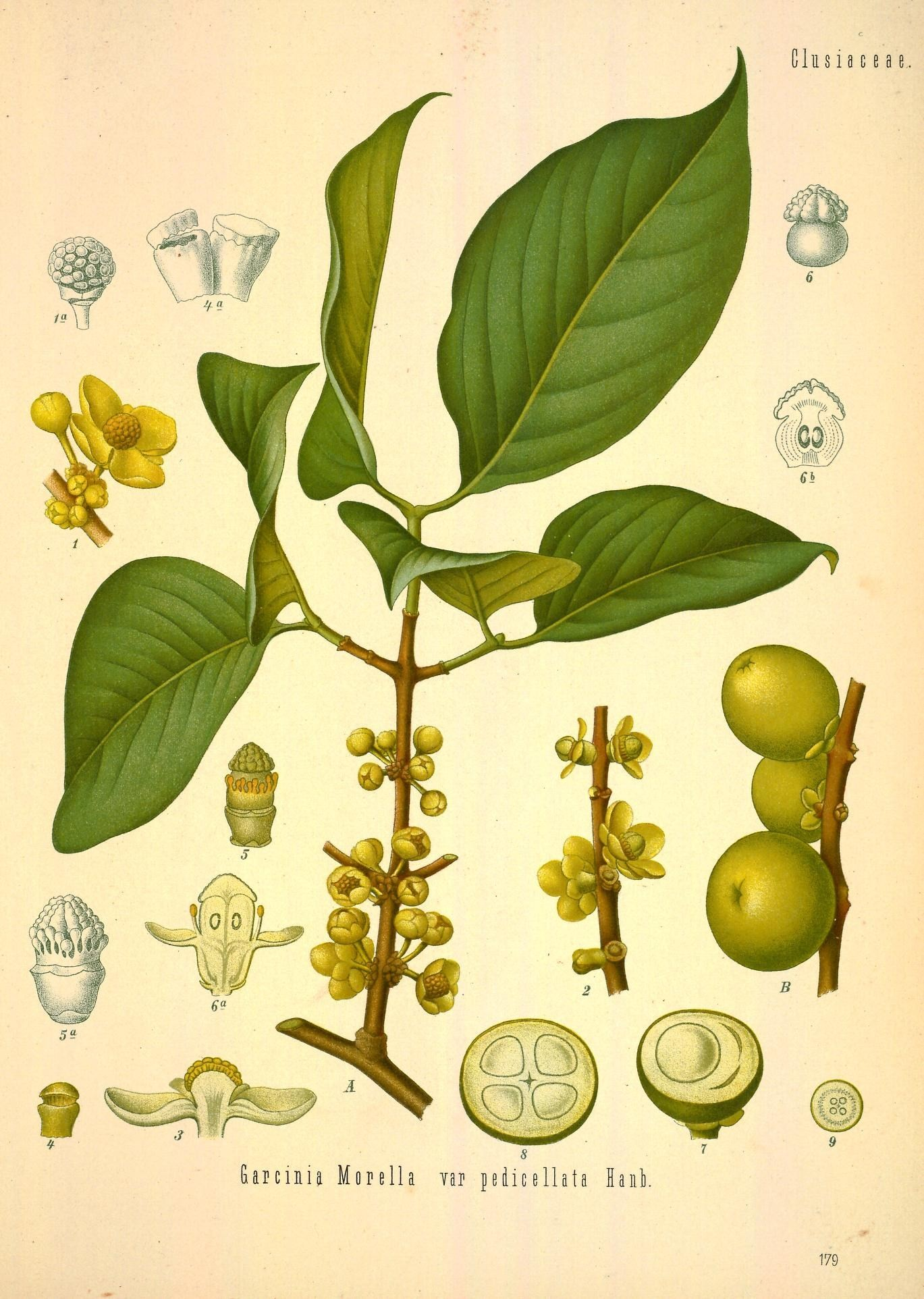 Garcinia. A Blüthenzweig der männlichen Pflanze, natürl. Grösse; B Fruchtzweig, desgl.; 1 Zweigstück mit männlichen Blüthen, vergrössert; 1a Staubgefässköpfchen nach Hanbury, desgl.; 2 Zweigstück mit weiblichen Blüthen, desgl.; 3 männliche Blüthe im Längsschnitt, desgl.; 4 geöffnetes Staubgefäss, desgl.; 4a 2 Staubgefässe geöffnet und ungeöffnet, nach Bâillon; 5 Fruchtknoten mit Staminodienkranz, desgl.; 5a dieselbe Figur, nach Hanbury; 6 Fruchtknoten mit Narbe, desgl., nach Hanbury; 6a weibliche Blüthe im Längsschnitt, desgl.; 6b Fruchtknoten im Längsschnitt, desgl., nach Hanbury; 7 Fruchtquerschnitt mit nur einem fruchtbaren Fache, natürl. Grösse; 8 derselbe mit 4 fruchtbaren Fächern, desgl.; 9 Querschnitt durch den Fruchtknoten, vergrössert.